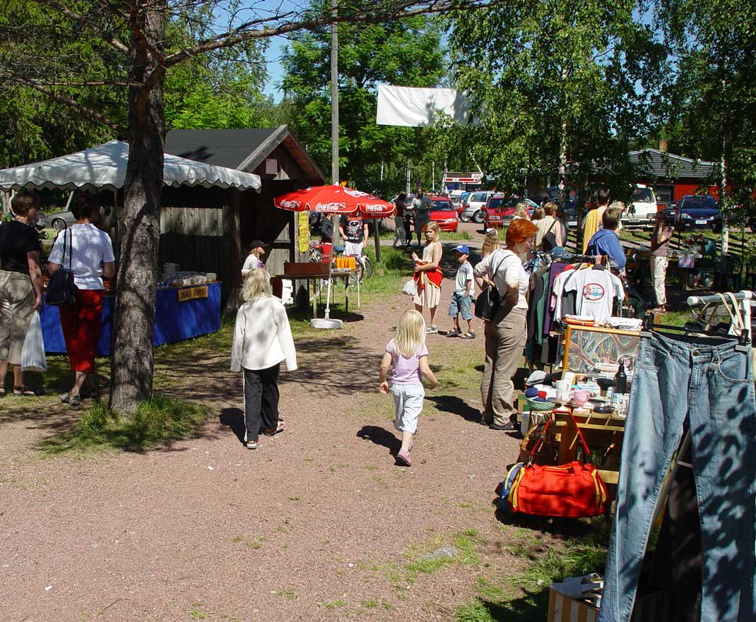 Åland-Eckerö. Markt in Storby